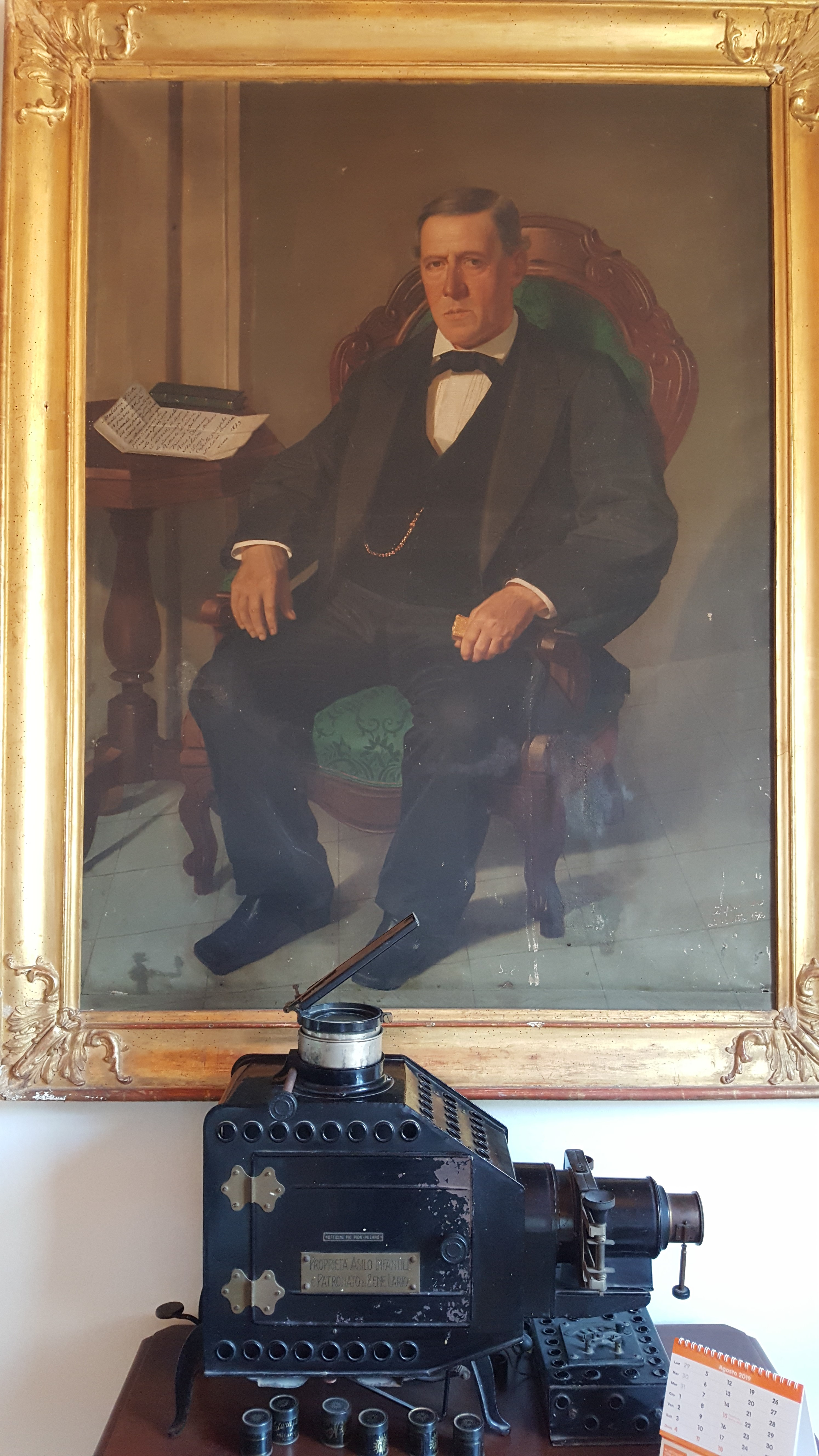 Ritratto di Pietro Maldini, primo emigrato in Cile, nel Palazzo municipale di Bene Lario This is a photo of a monument which is part of cultural heritage of Italy.